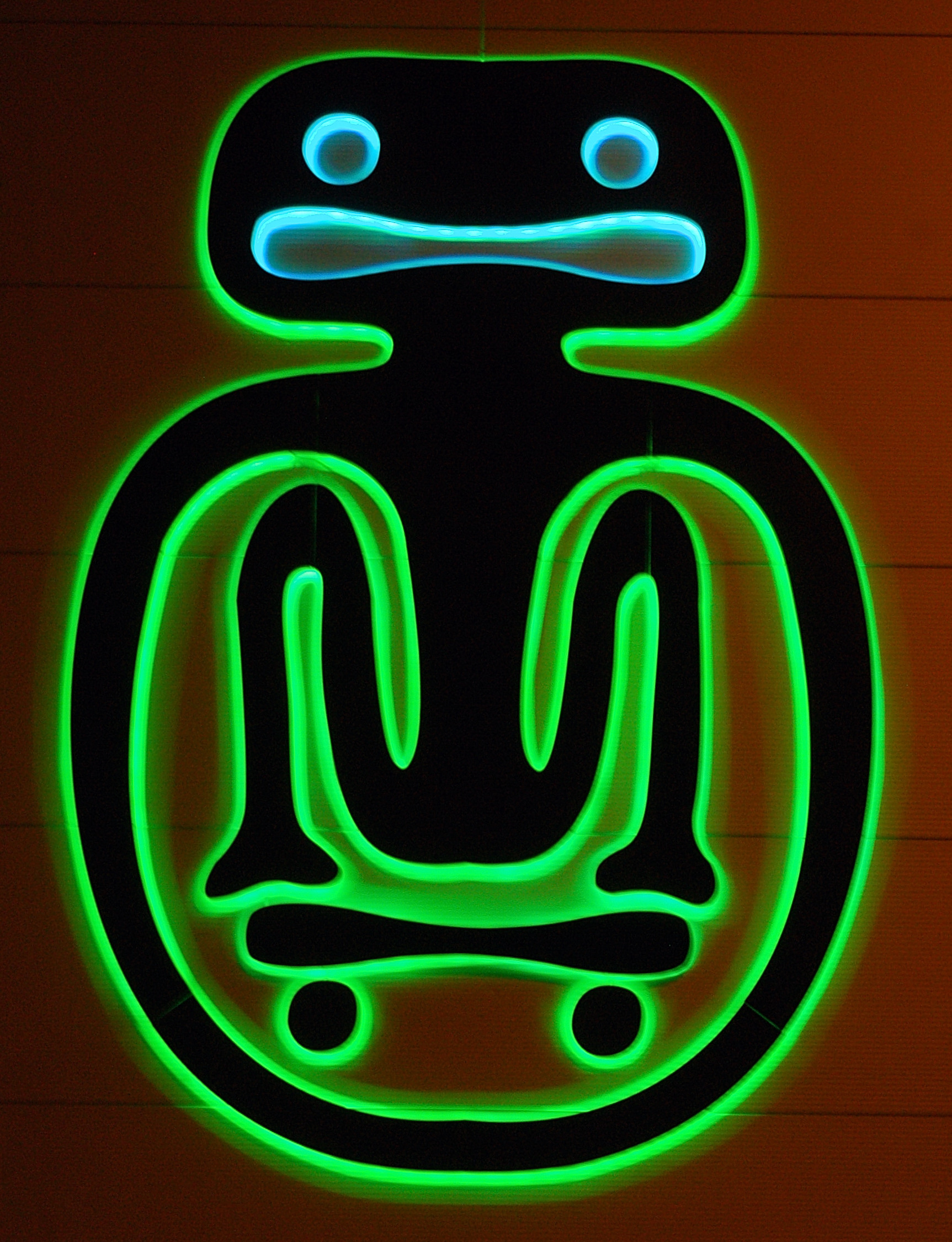 "Fokuserat här för ett koncentrat nu" av Matti Kallioinen 2010 utförd i brons placerad på fasaden till Karlstad Curling Arena/Skate/BMX-hall, Tingvalla sportcenter, Sandbäcken, Karlstad.